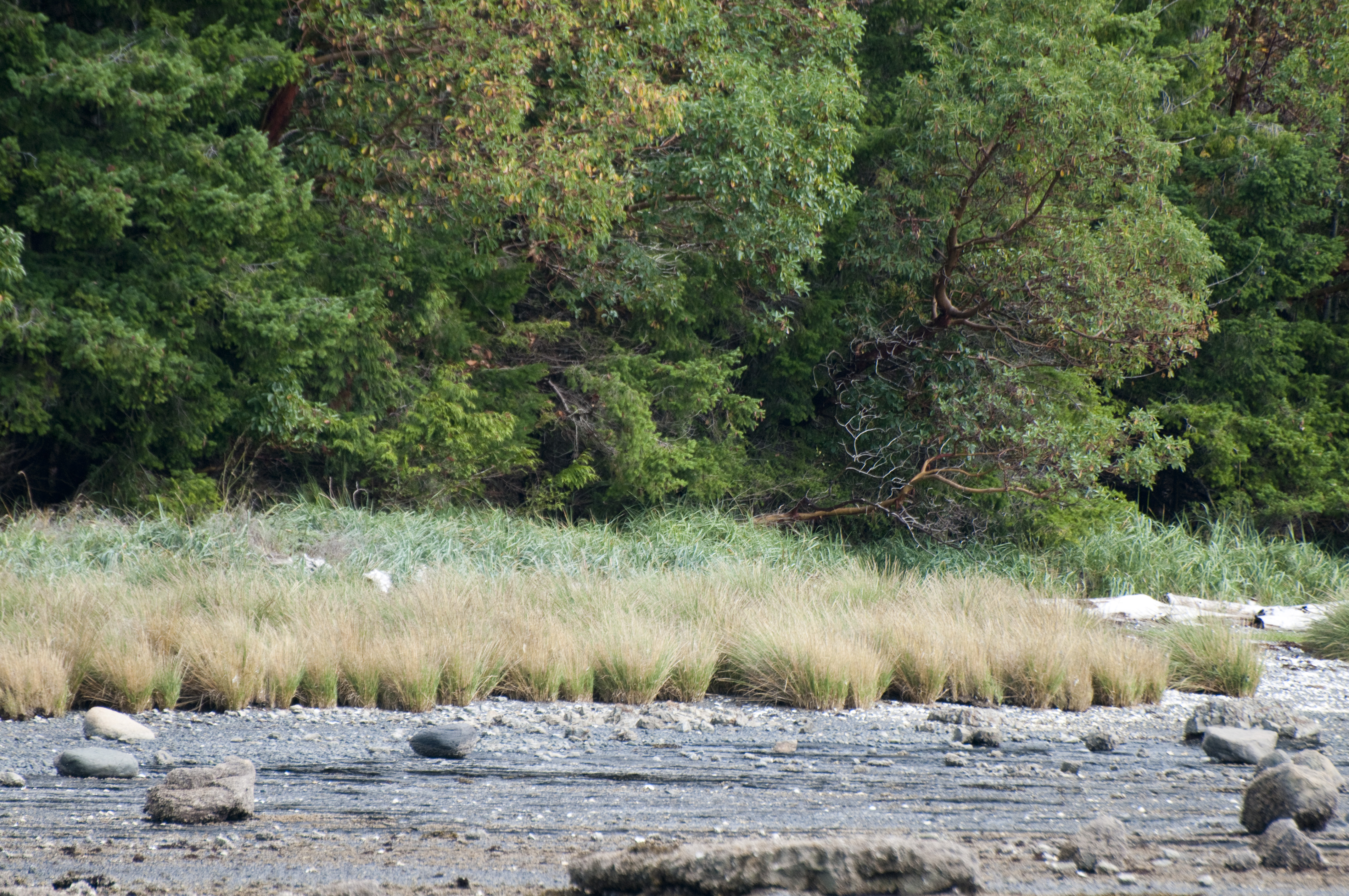 Spartina Densiflora Denman Isl 1